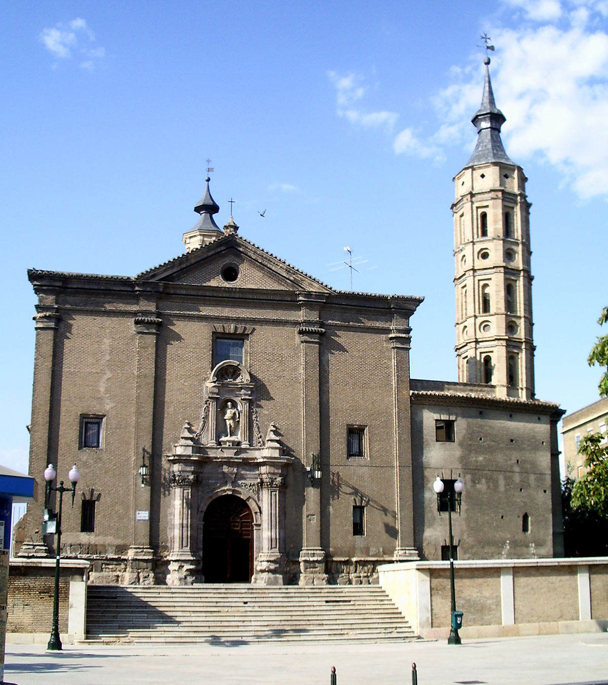 Iglesia de San Juan de los Panetes (Zaragoza, España)